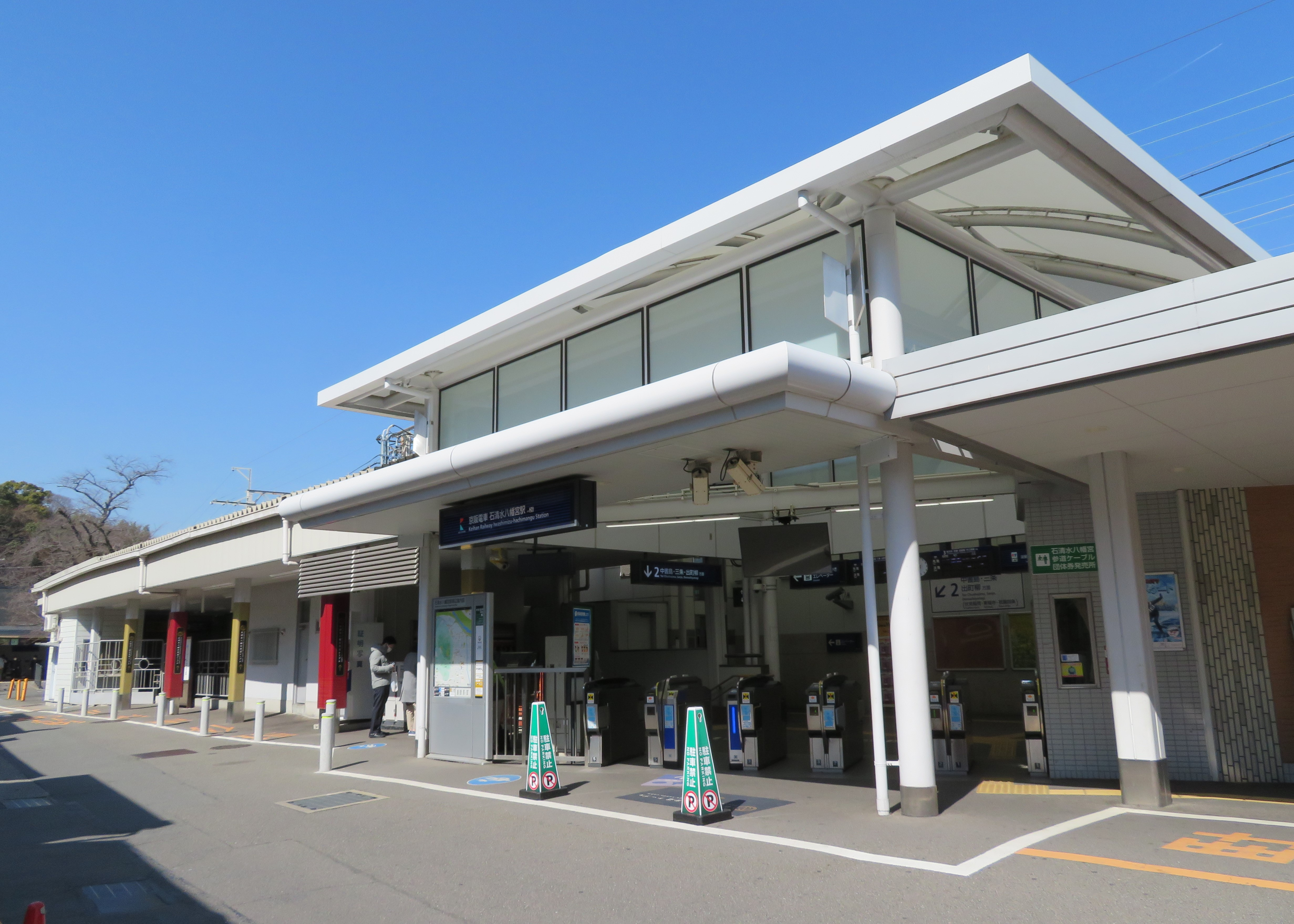 京阪電鉄石清水八幡宮駅